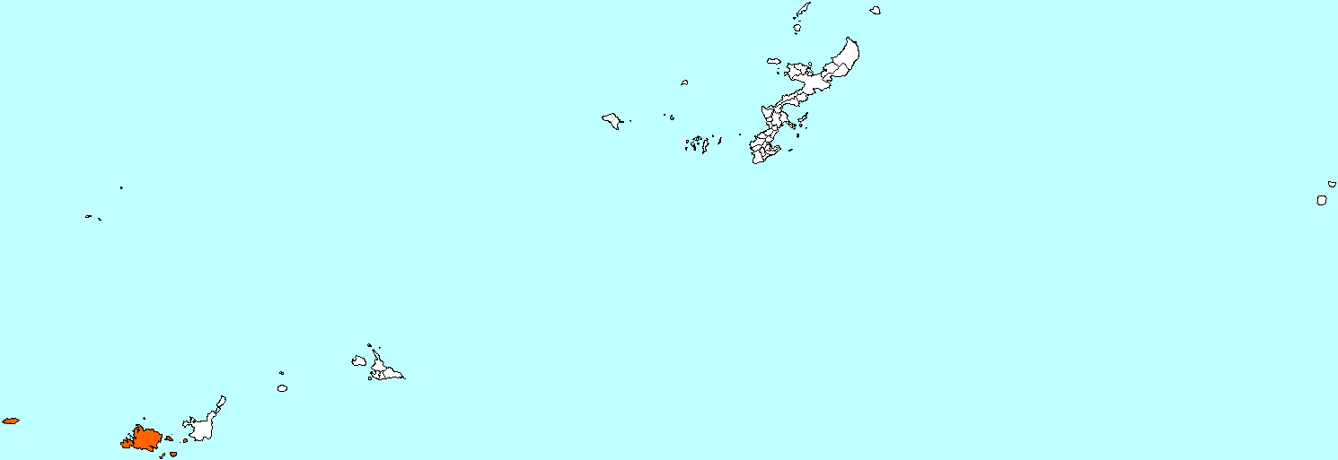 Okinawa Yaeyama-gun